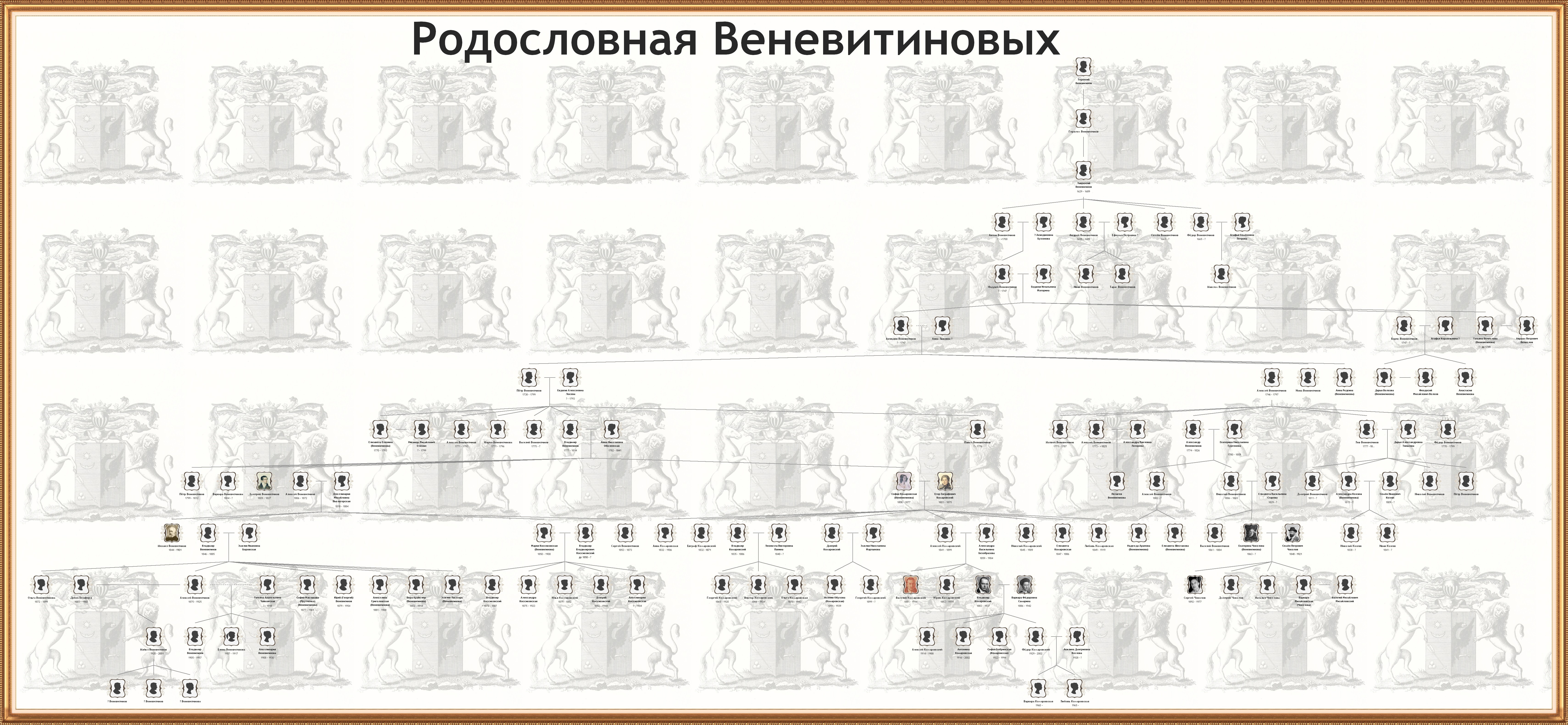 Генеалогическое дерево рода Веневитиновых. Источники информации: 1. Руммель В. В., Голубцов В. В. Веневитиновы // Родословный сборник русских дворянских фамилий. — СПб: издательство Суворина А. С., 1886. — Т. 1. — С. 172 (178). 2. Rodovid: Веневитиновы. 3. Энциклопедия Панинского района Воронежской области: 1, 2, 3. 4. Другие источники при работе над статьёй "Горожанка (Воронежская область)" Для будущих редакций: Шрифт дат: Trebuchet MS, 11пт Regular, "Не показывать" Имена: 12пт, Bold